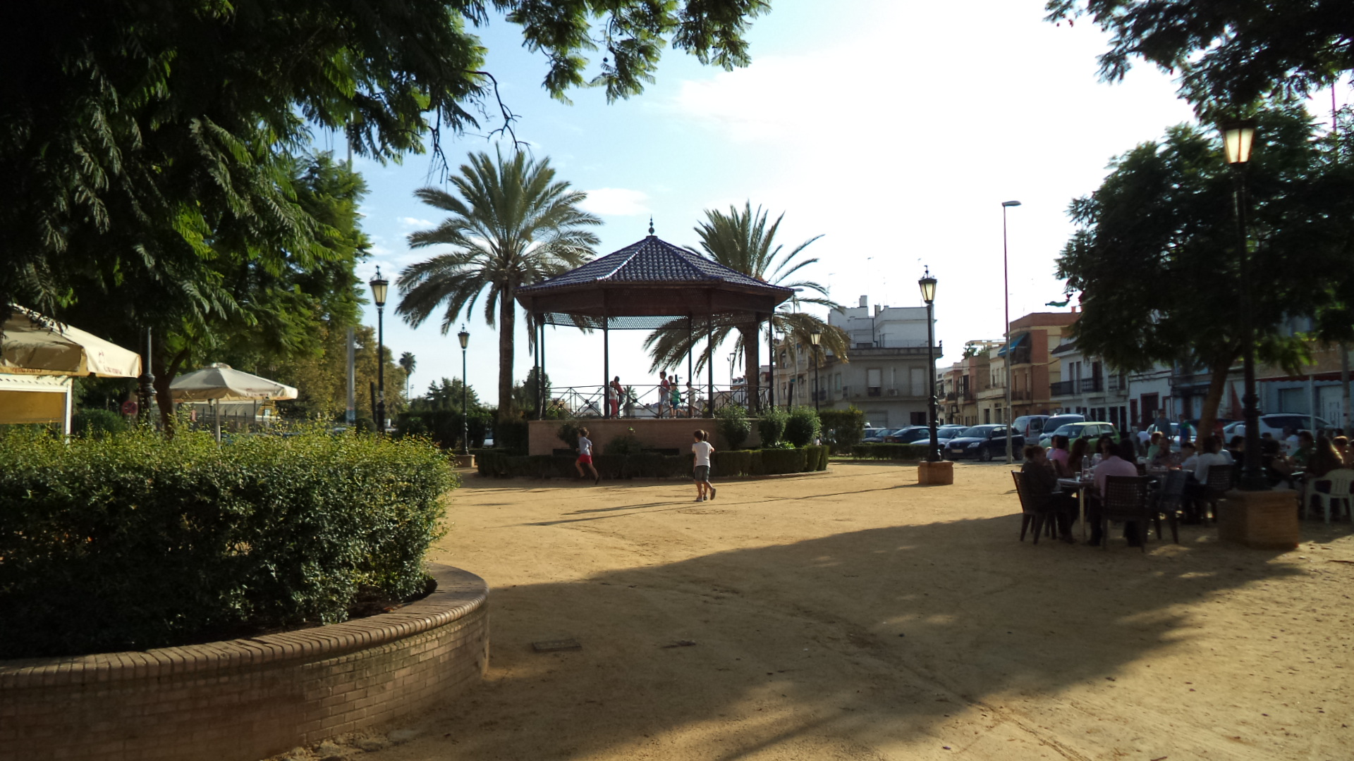 Quiosco de música en Coria del Río, Provincia de Sevilla